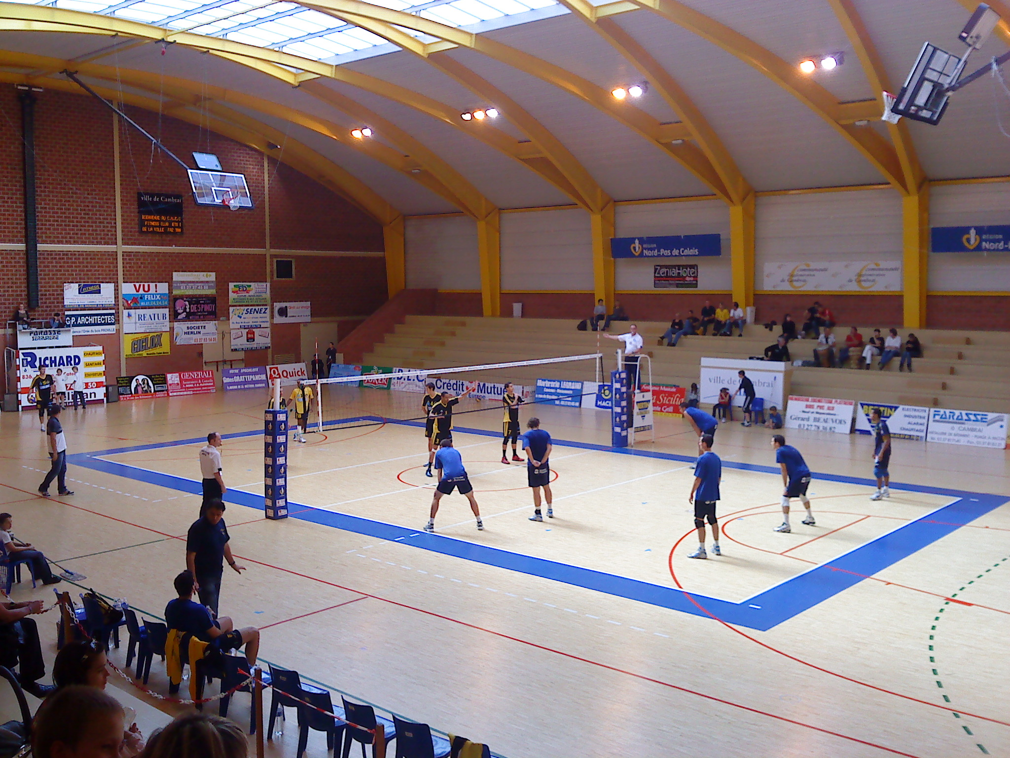 Lors d'un des matches du tournoi de volley de pré-saison organisé pour les clubs de la zone nord de la Ligue B masculine de volley.